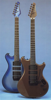 Die Spectrum-Serie wurde Mitte der 80er Jahre ein Hit für Westone.